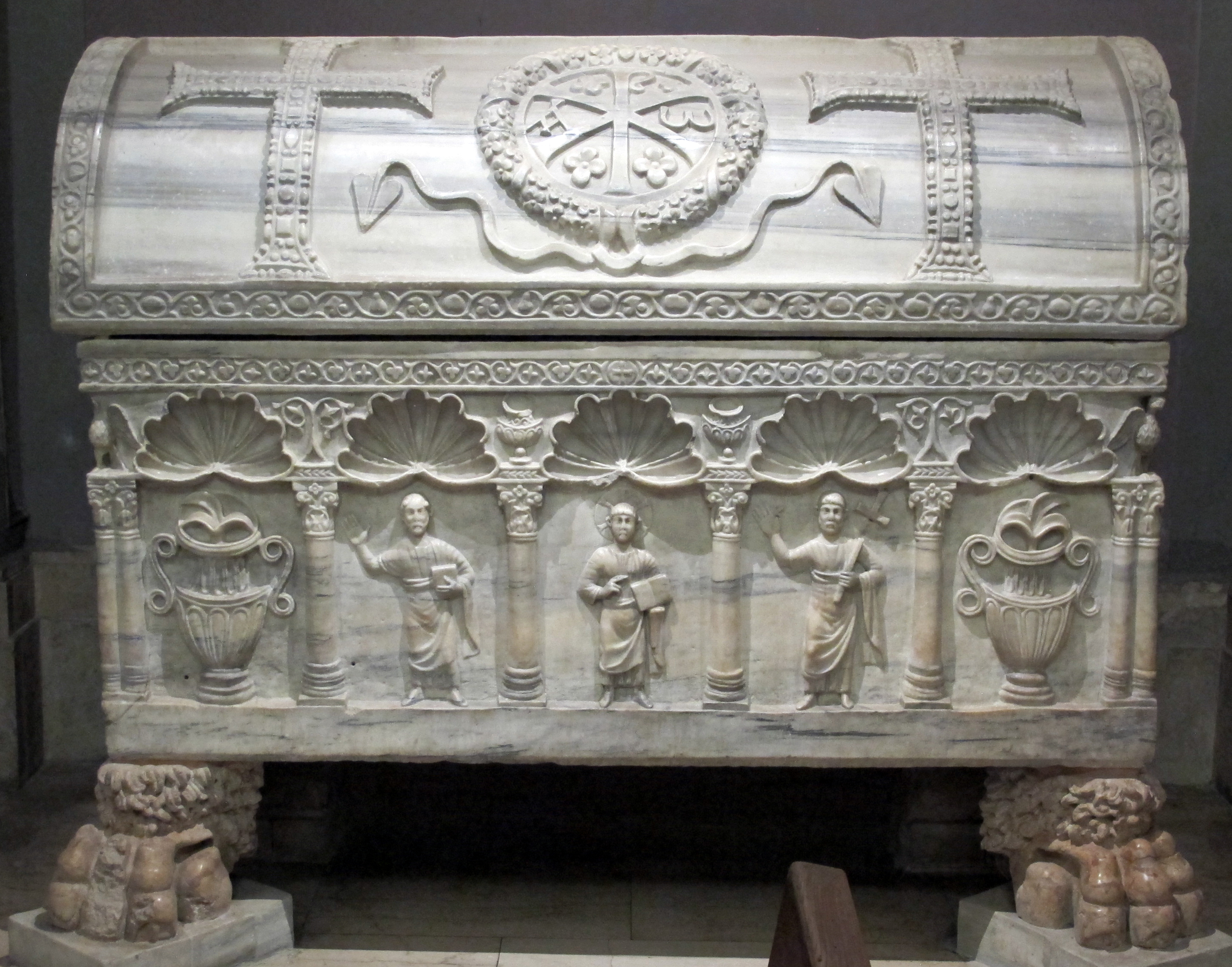 Duomo di ravenna, cappella della madonna del sudore, sarcofago di san barbaziano, V sec.